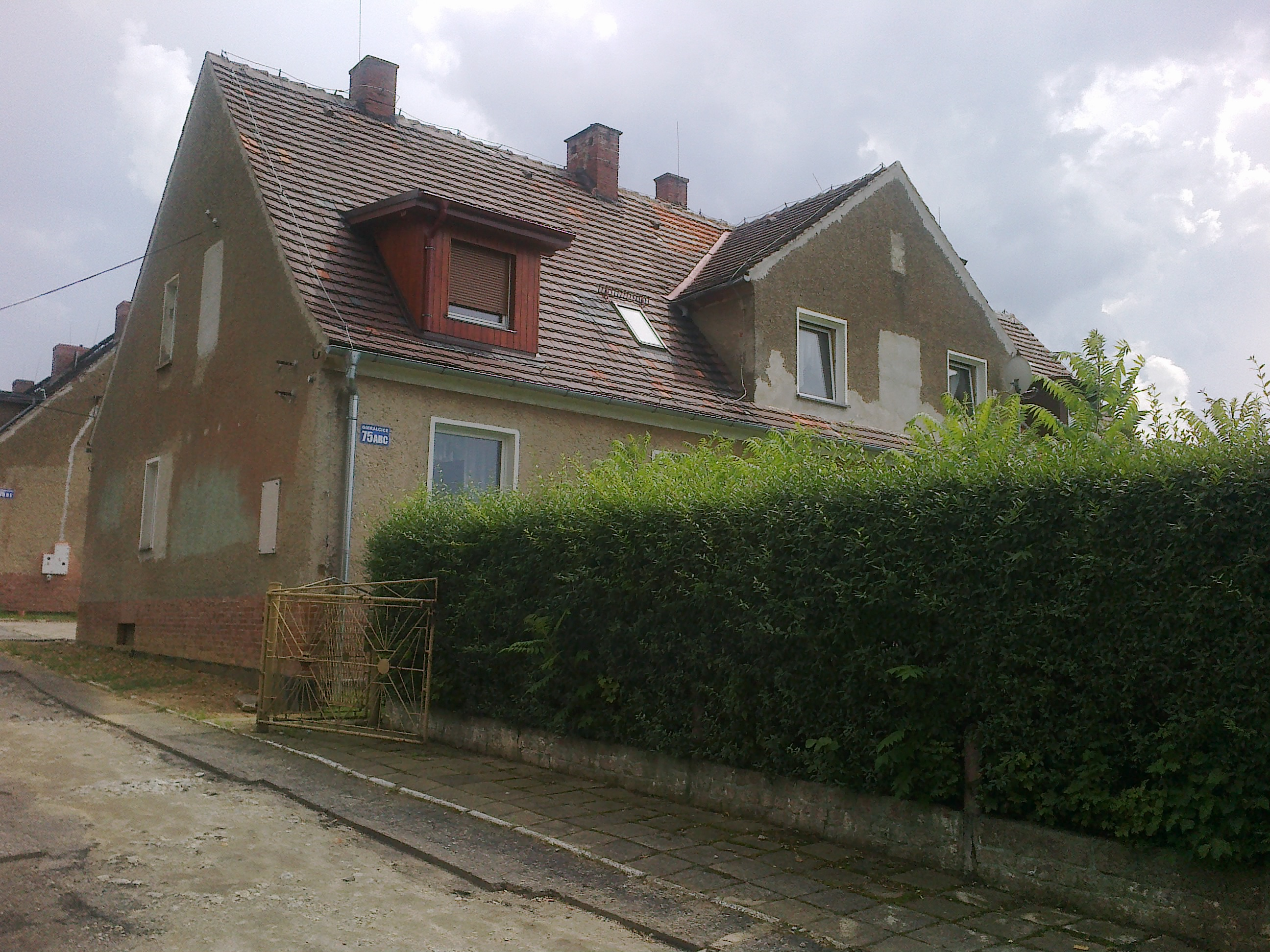 Gierałcice, była Strażnica Wojsk Ochrony Pogranicza (WOP) Gierałcice, następnie Strażnica Straży Granicznej (SG). Obecnie budynki mieszkalne